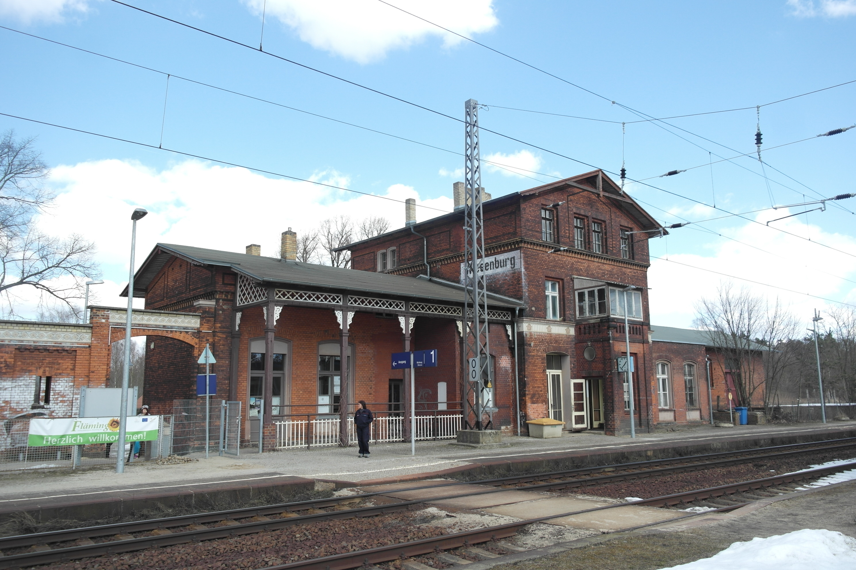 Bahnhof Wiesenburg, denkmalgeschützt. Bahnhofsgebäude von Südwesten